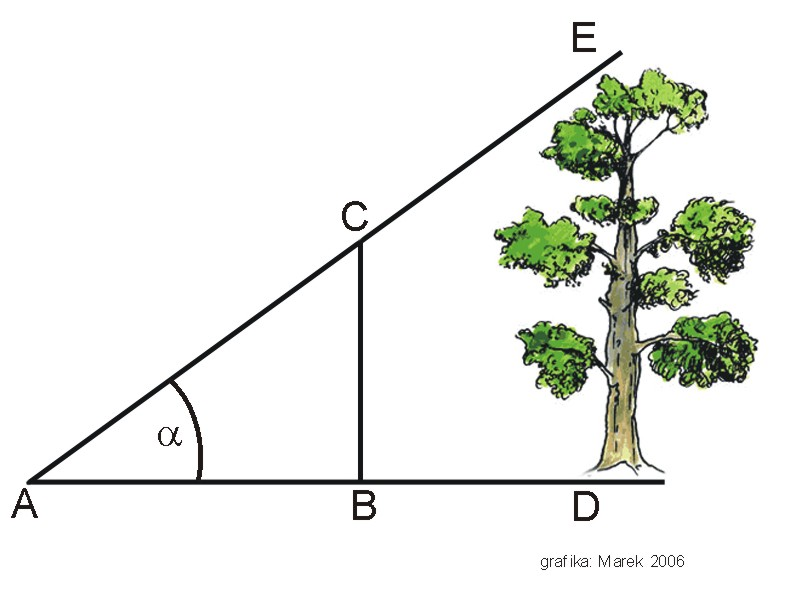 Triangulation/ Trangulacja - zasada niwelacji trygonometrycznej